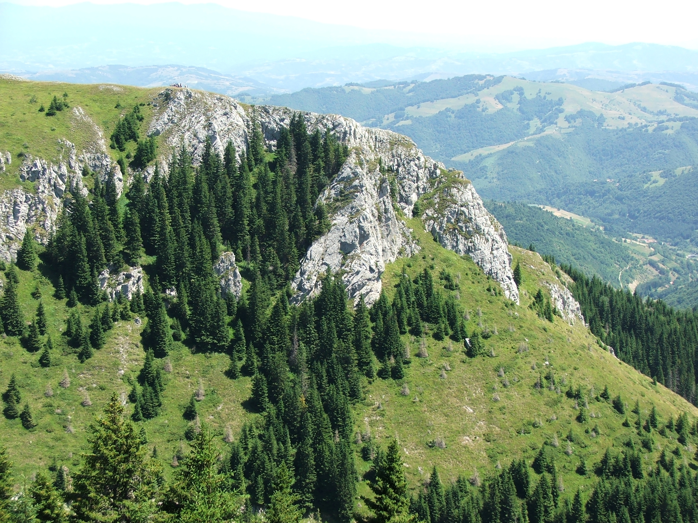 Ово је фотографија заштићеног природног добра у Србији под шифром: НП02This is a a photo of a natural area in Serbia with ID: НП02 Nacionalni park Kopaonik (NP02) - lokalitet Bele Stene Српски (ћирилица): Национални Парк Копаоник (НП02) - локалитет Беле Стене